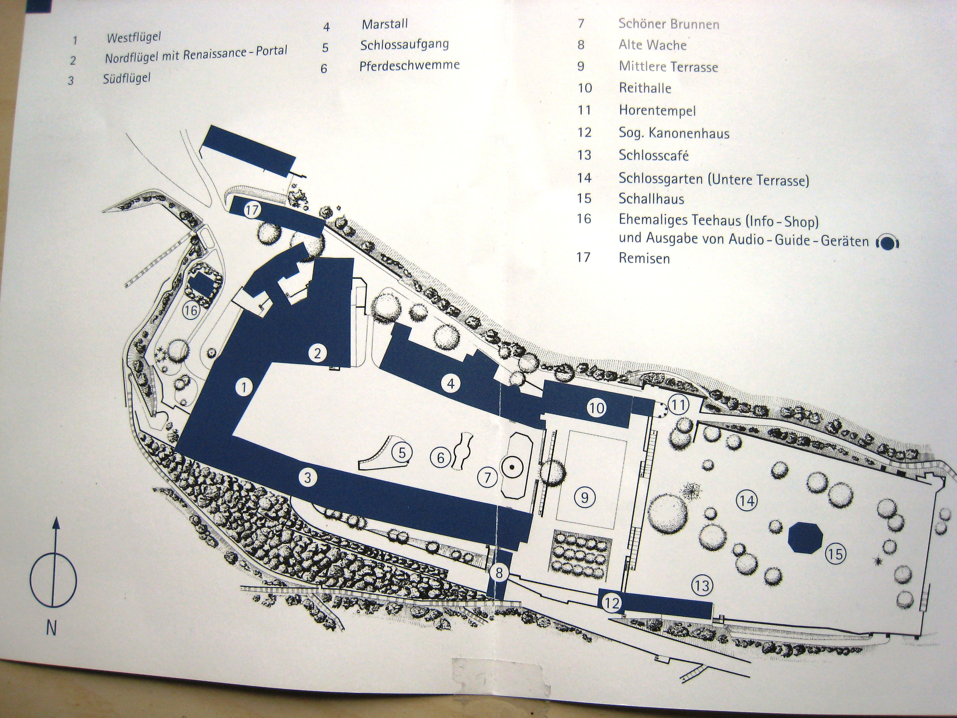 Übersichtsplan der Anlage der Heidecksburg in Rudolstadt